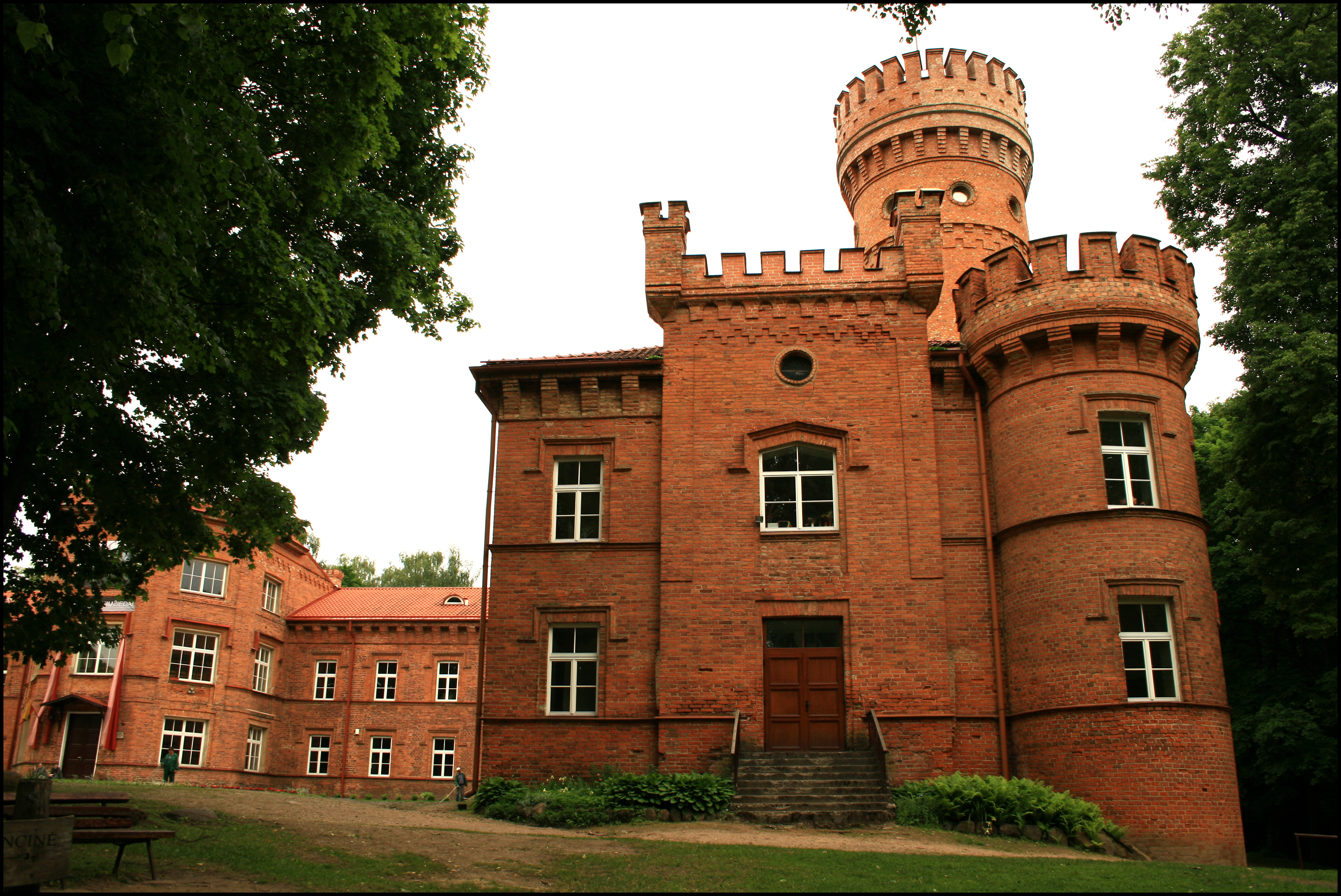 Raudonės pilis